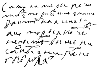 Собственноручная запись Петра I на внутренней стороне переплета гражданской азбуки с исправлениями Петра I. (Hand-written note by Peter I on the inner side of the cover of the civil Russian alphabet with marks by Peter I.)